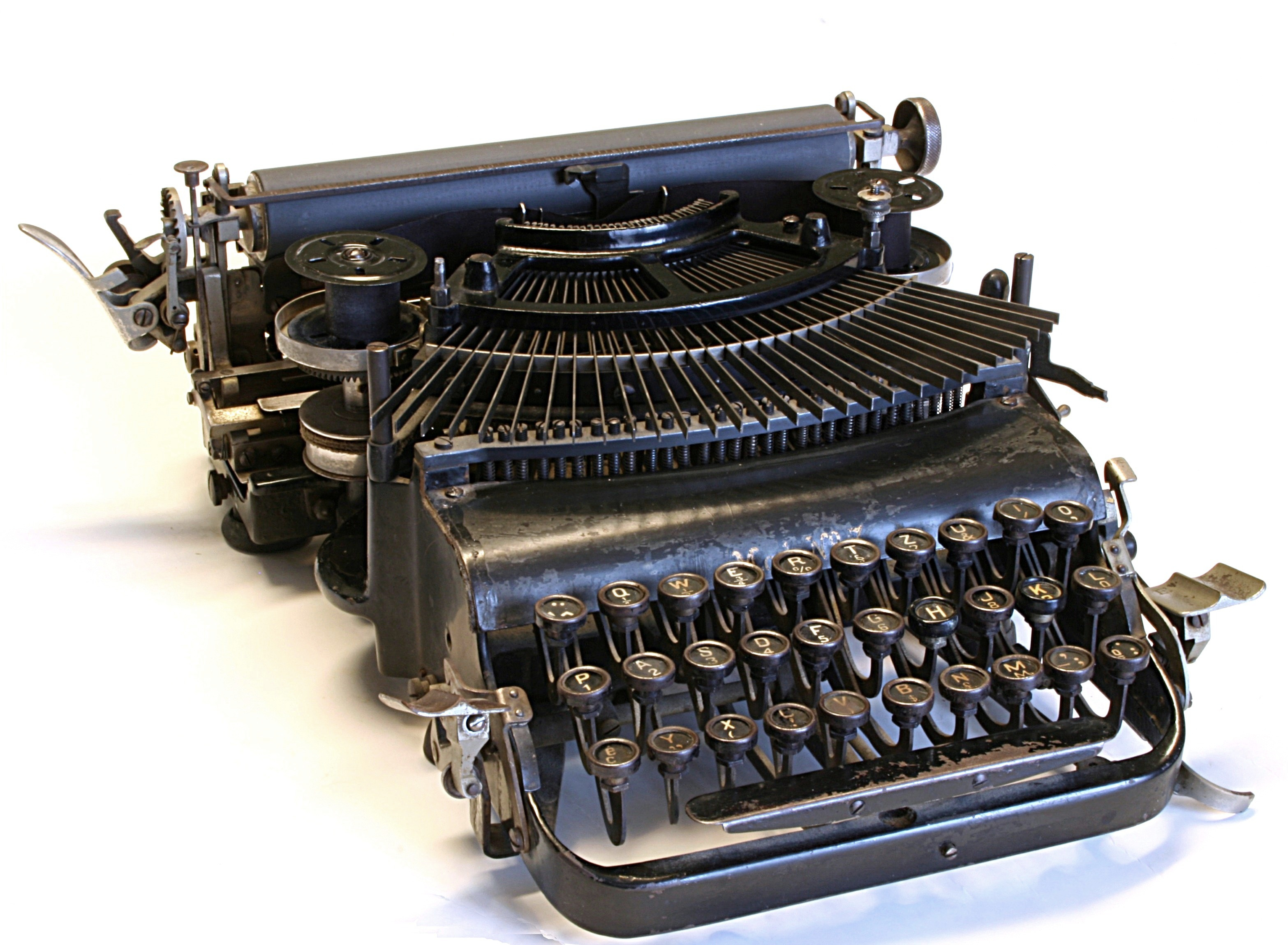 Stoßstangen-Schreibmaschine "Adler" Modell No. 7 (ohne Frontdeckel), Baujahr um 1915